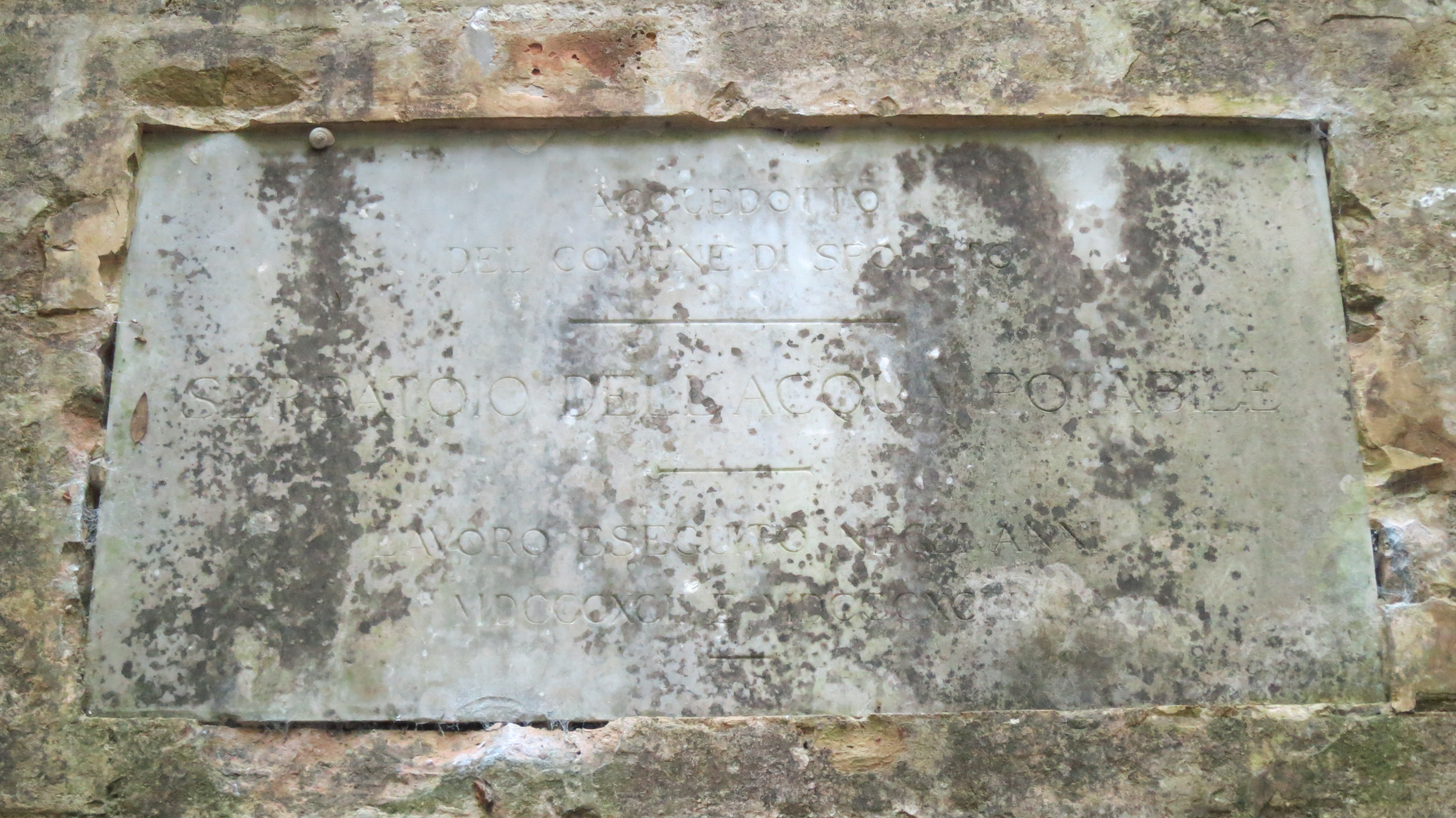 Targa posta accanto all'antica vasca di carico, detta la Rifolta, posta a monte del Ponte delle Torri a memoria degli importanti lavori di ammodernamento degli acquedotti di Spoleto, eseguiti sul finire dell'800.